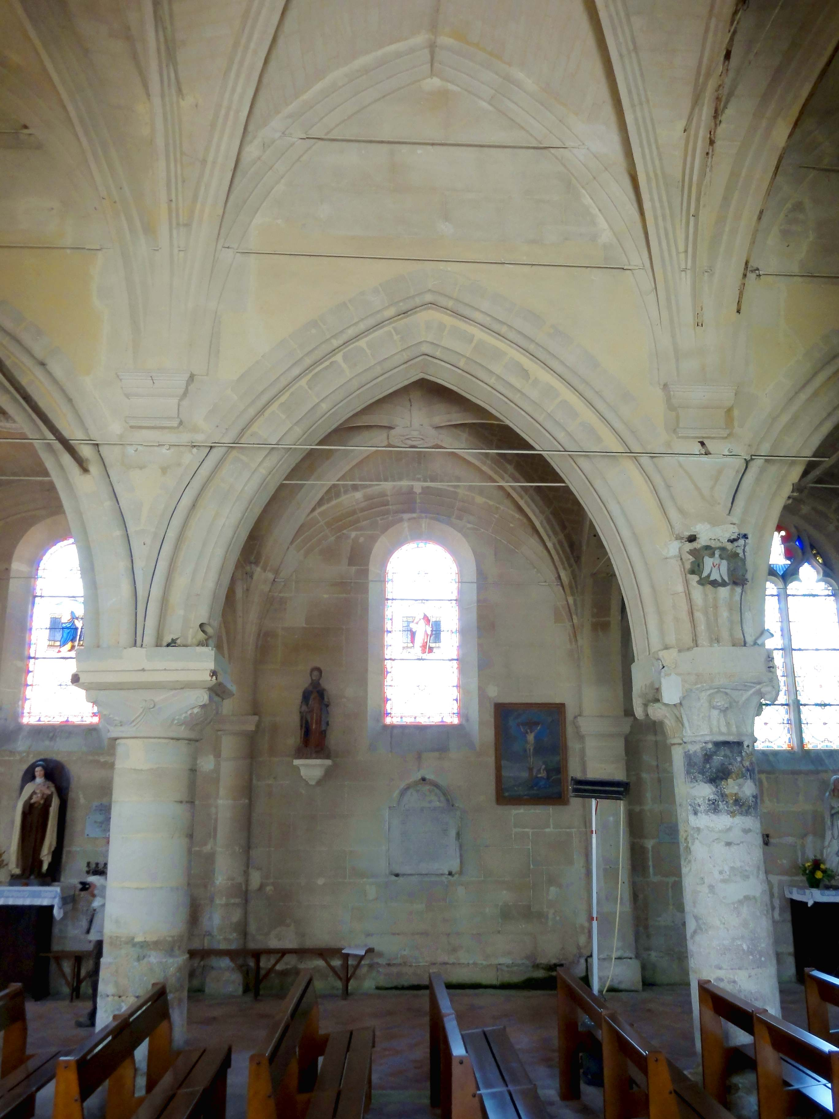 Intérieur de l'église (voir titre).